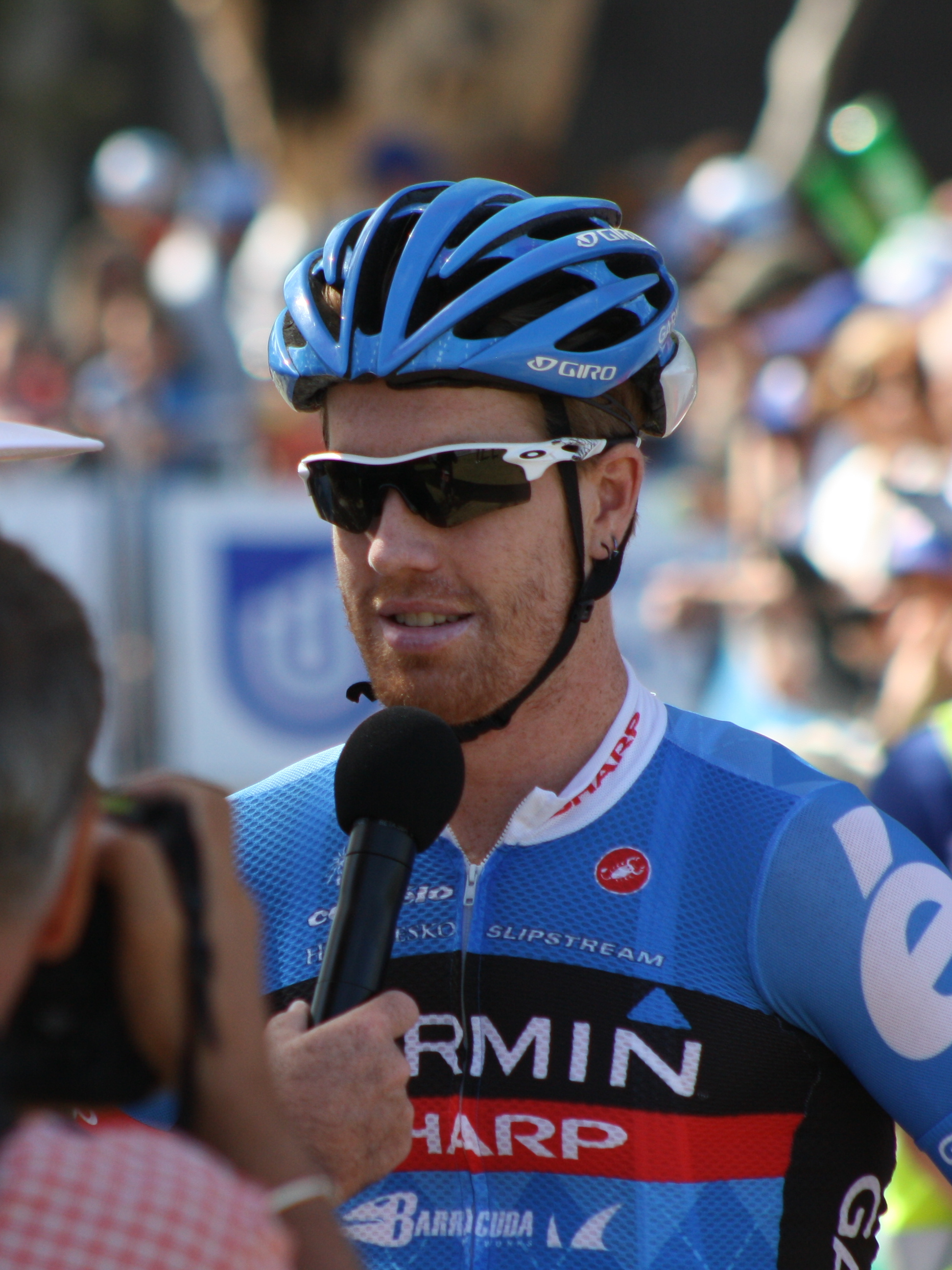 Tyler says hello